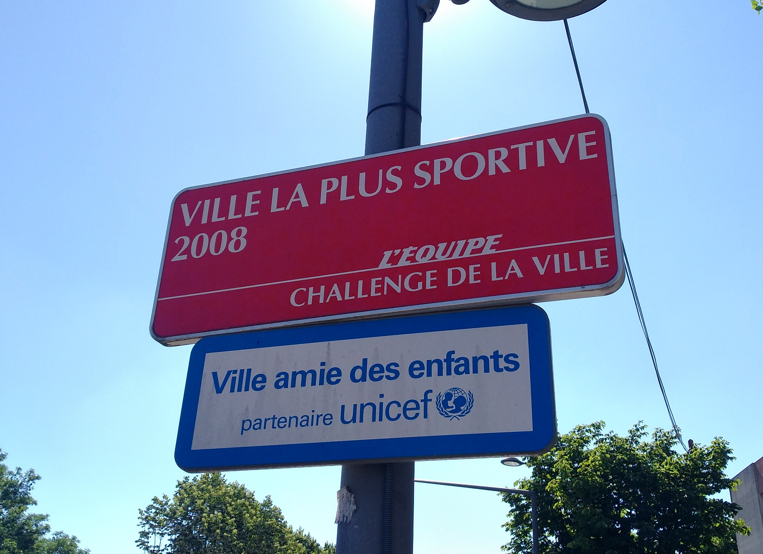 Panneau de la ville la plus sportive de France 2008 selon L'Équipe, et panneau de la ville amie des enfants (Unicef) à Bron (Rhône, France).